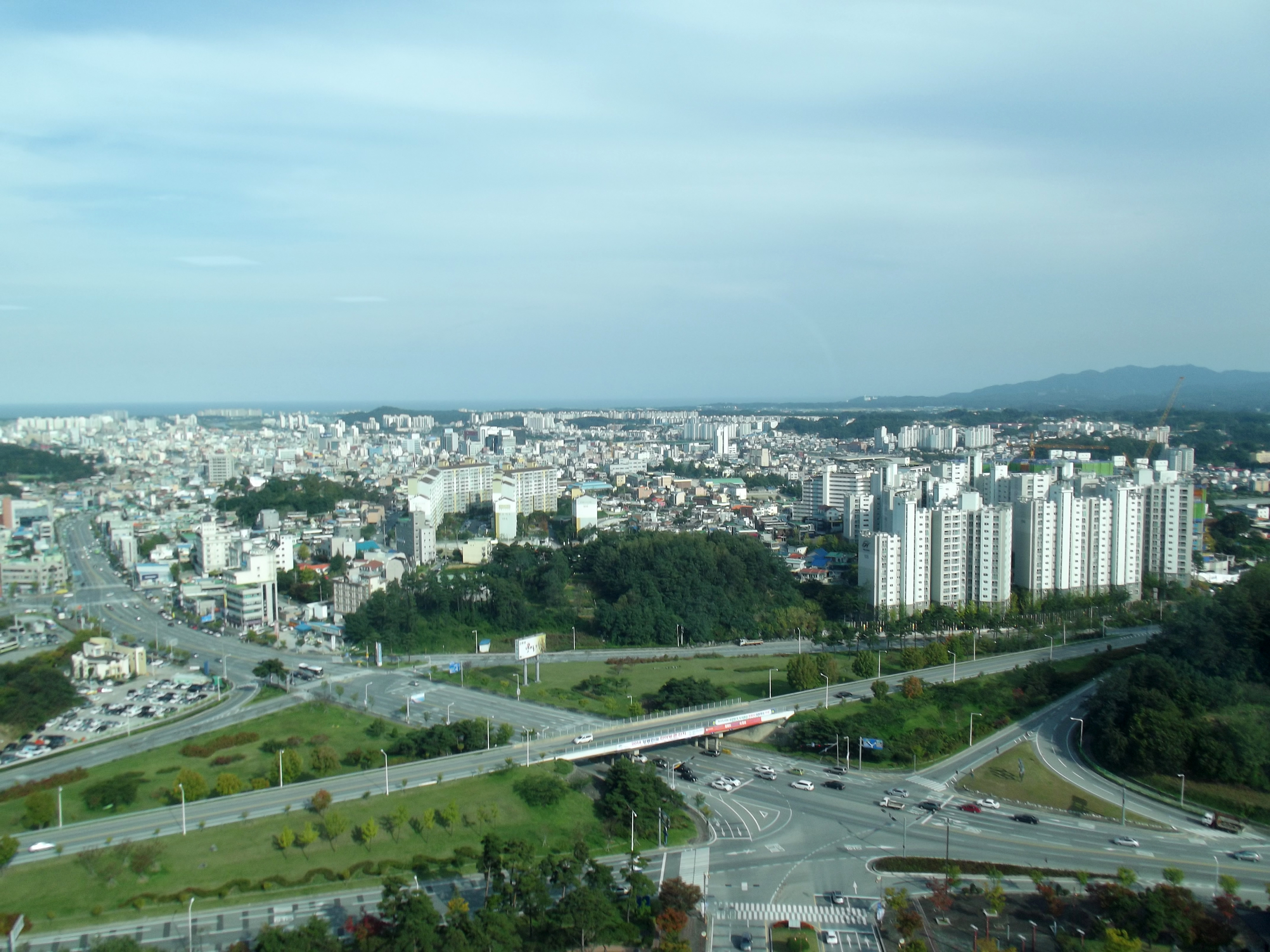 Zicht vanuit de toren van het gemeentehuis in Gangneung